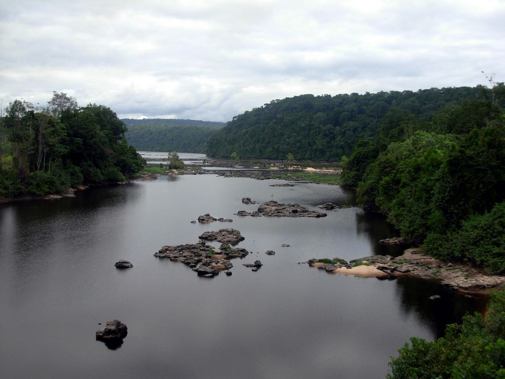 Fleuve Ogooué (Gabon/Afrique)